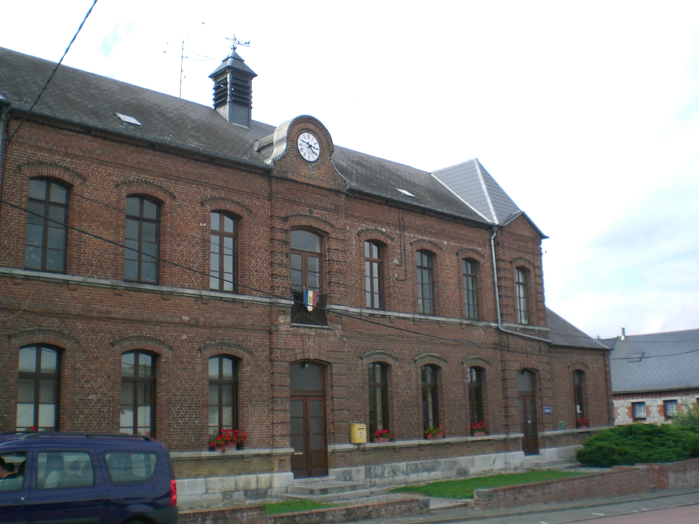 mairie d'hestrud nord france